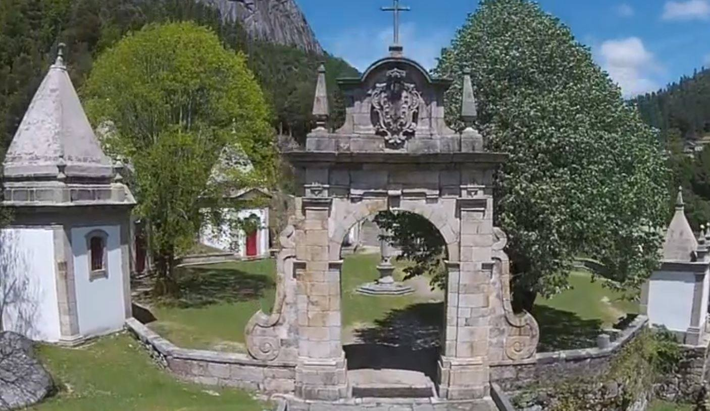 Santuario-de-Nossa-Senhora-da-Peneda